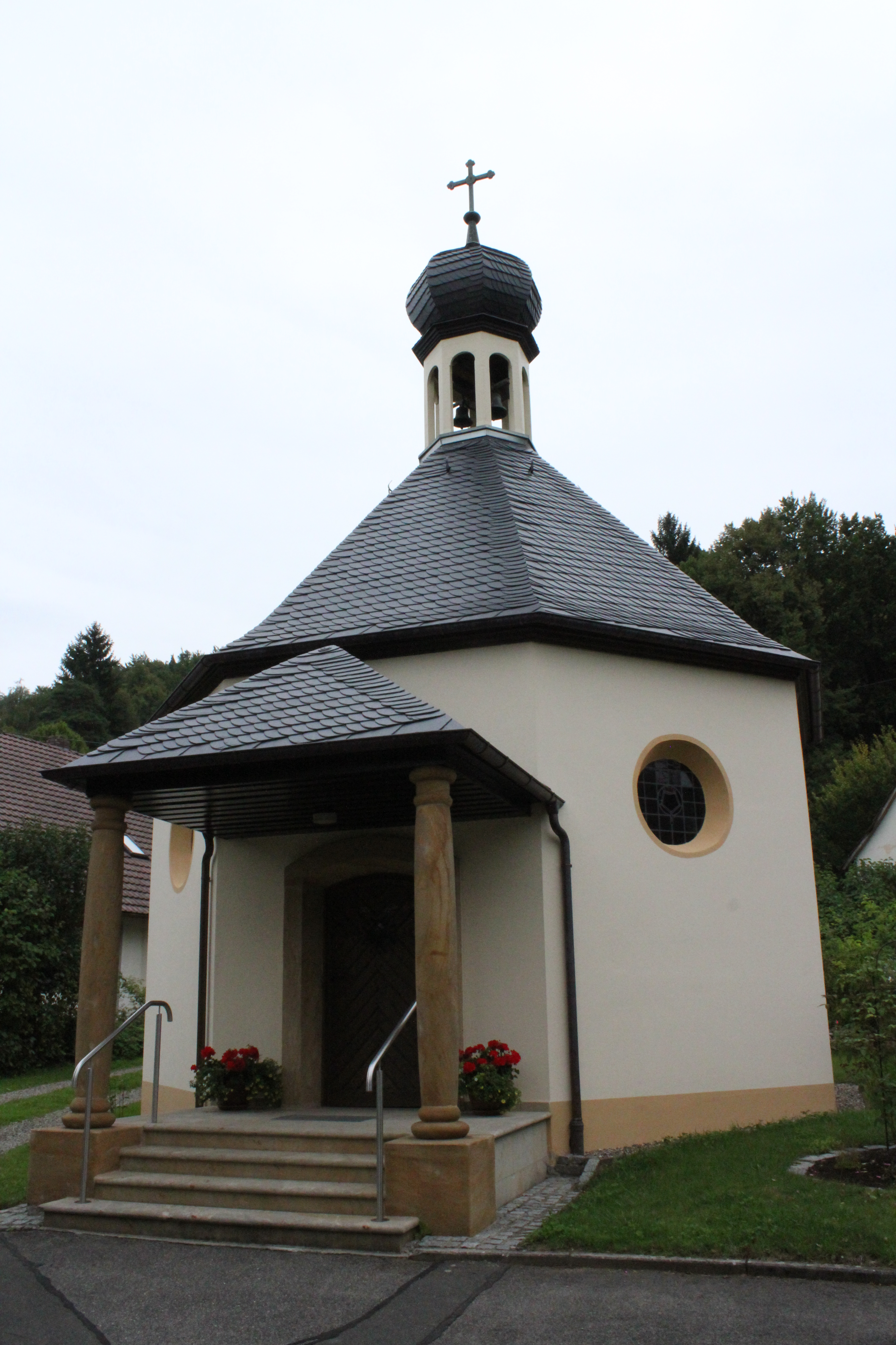 Die katholische Kapelle in Krassach